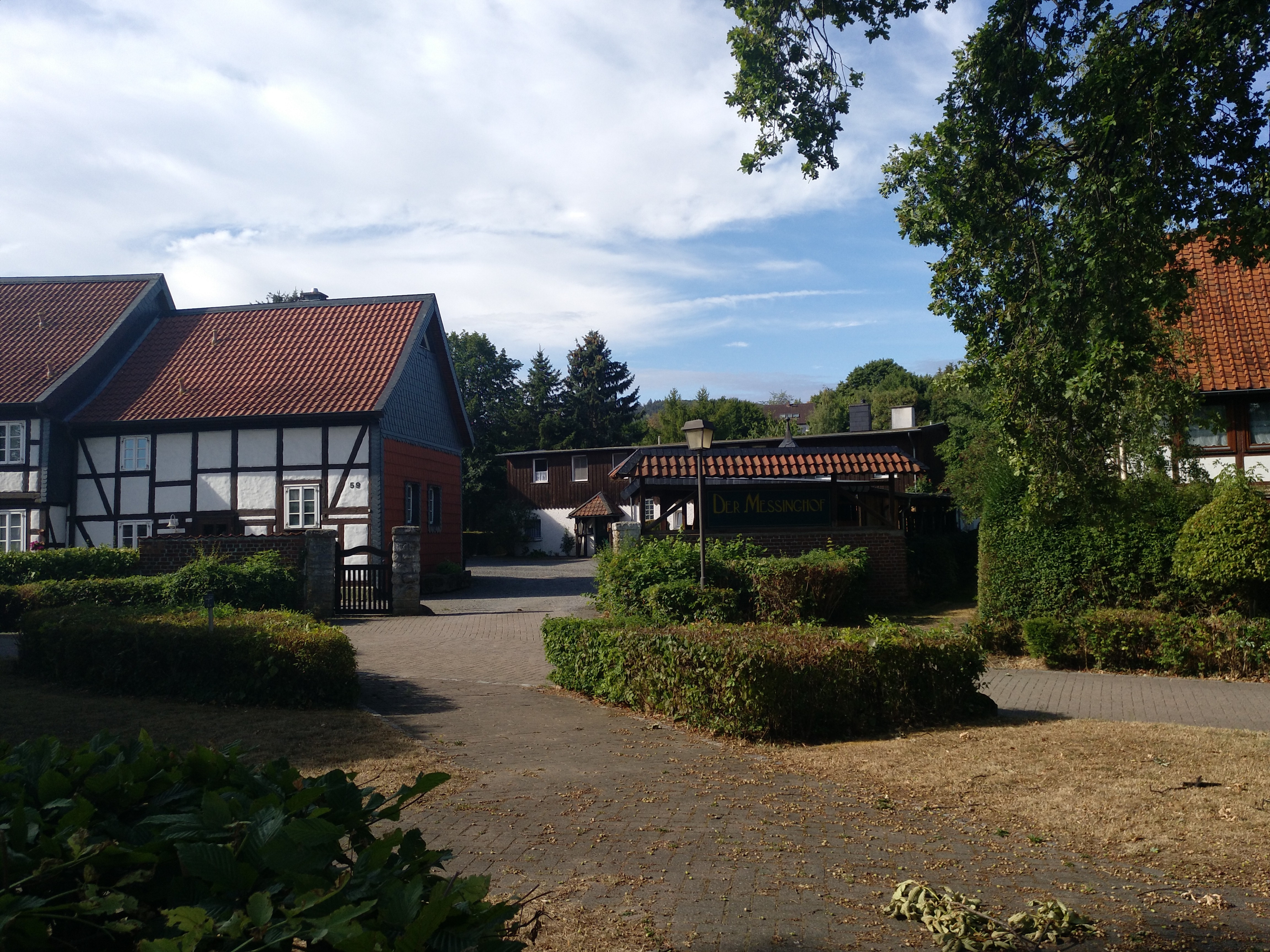 Eingang des Bündheimer Messinghofes.